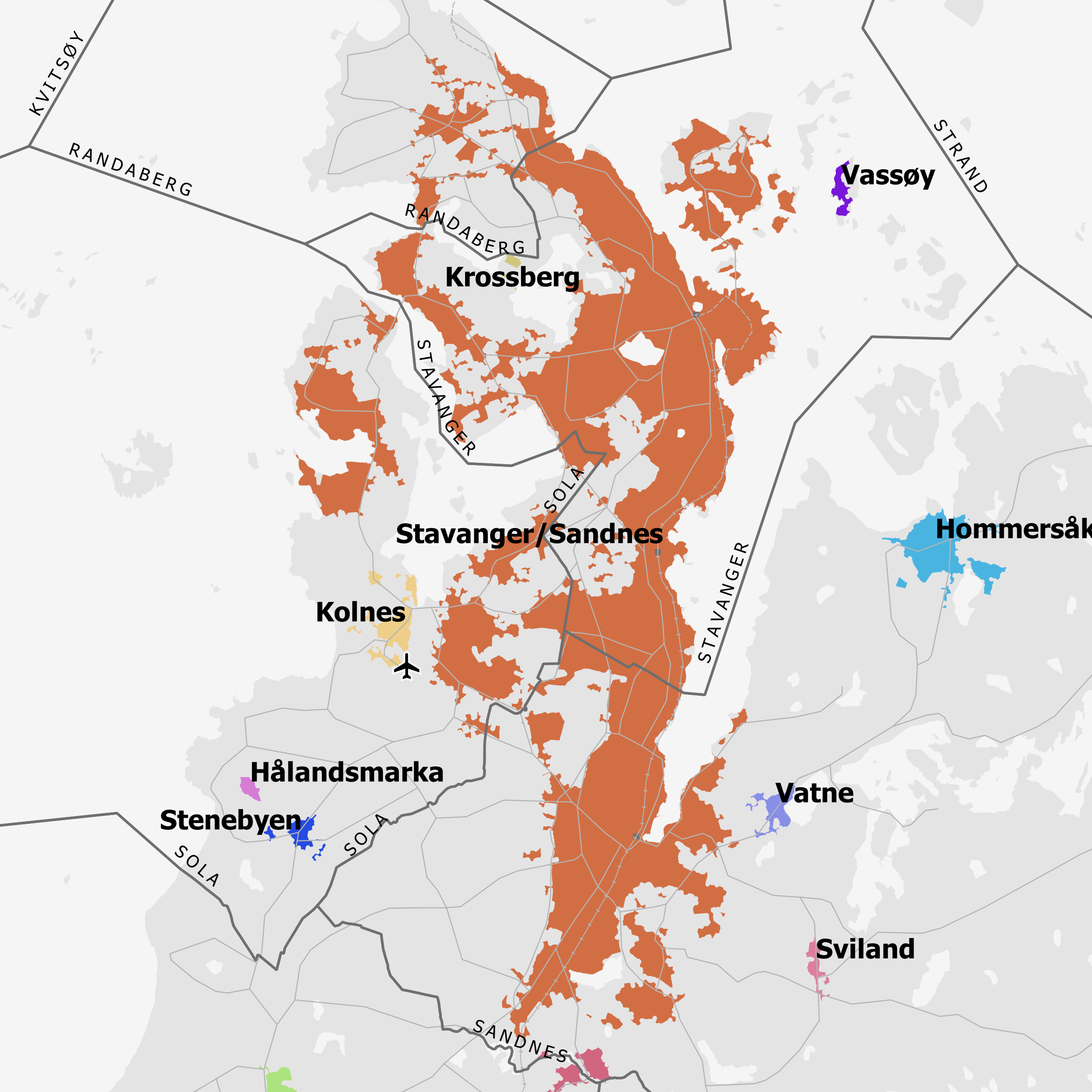 Tettsted 4522 Stavanger/Sandnes pr. 1.1.2018